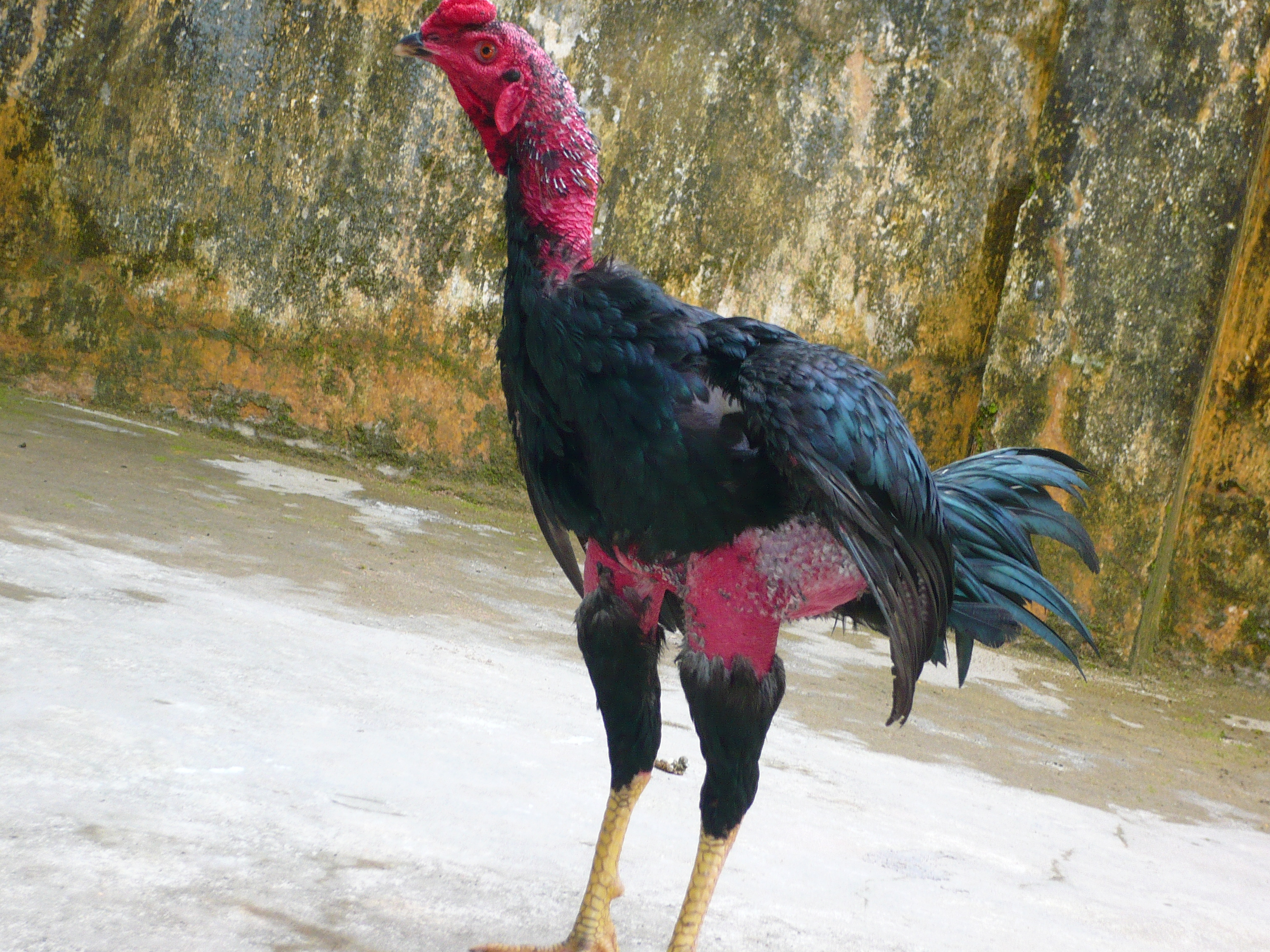 Gà chọi